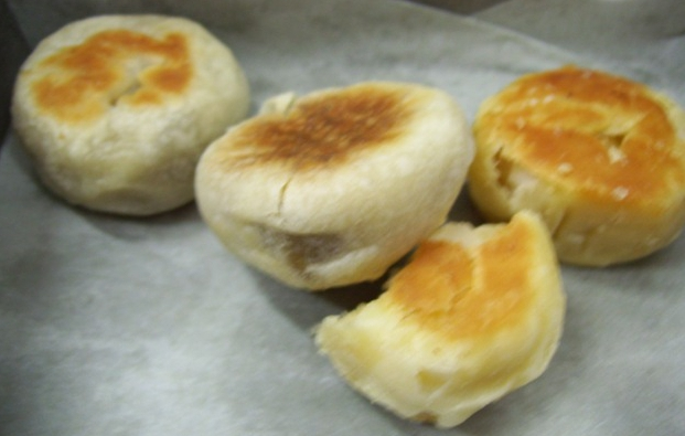 Bakpia pathok